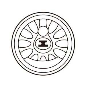 中文（台灣）: 臺灣總督府鐵道部徽章(大正時期)